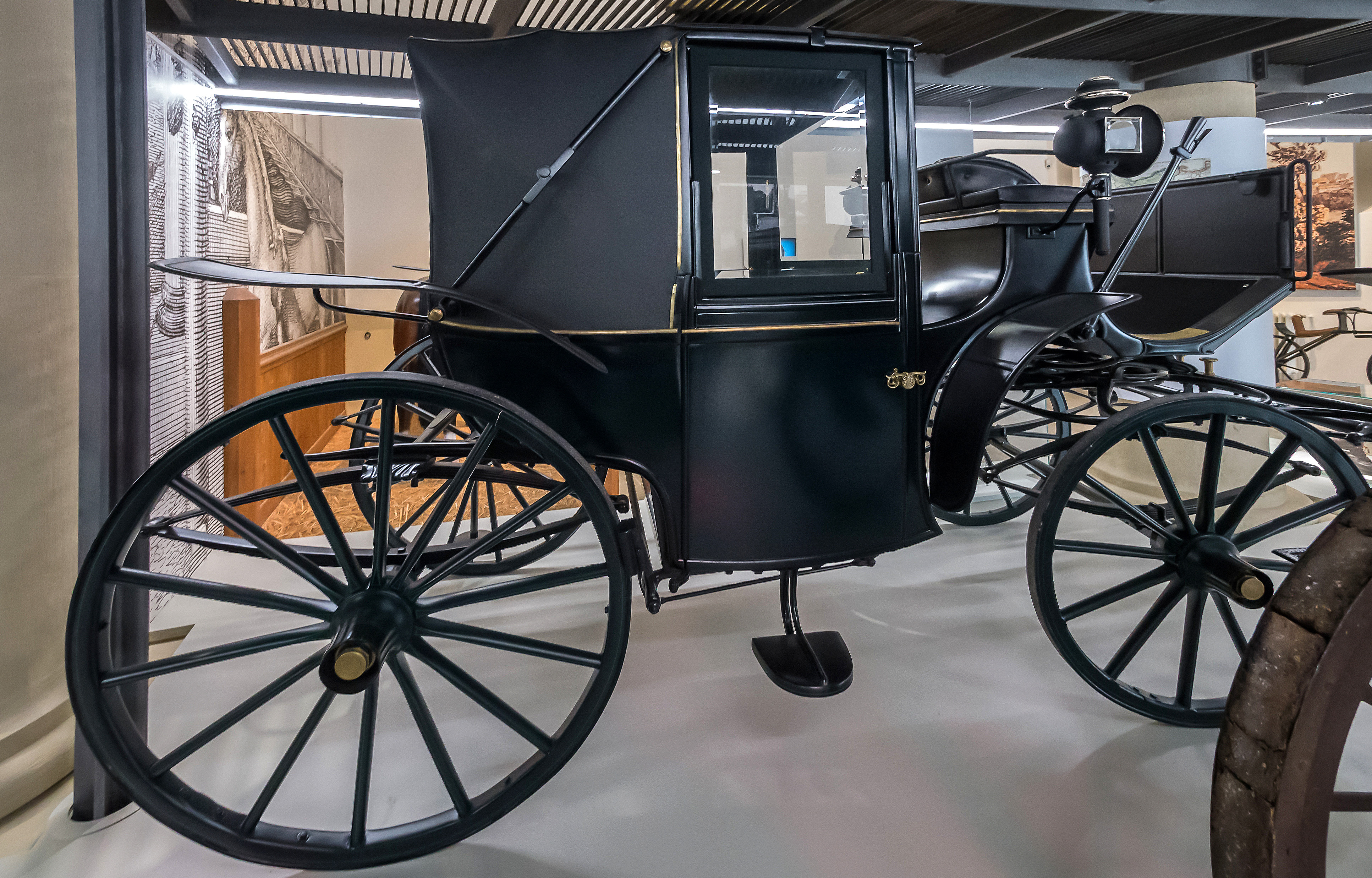 Verkehrsmuseum Dresden Kutsche Landaulet um 1900 IV